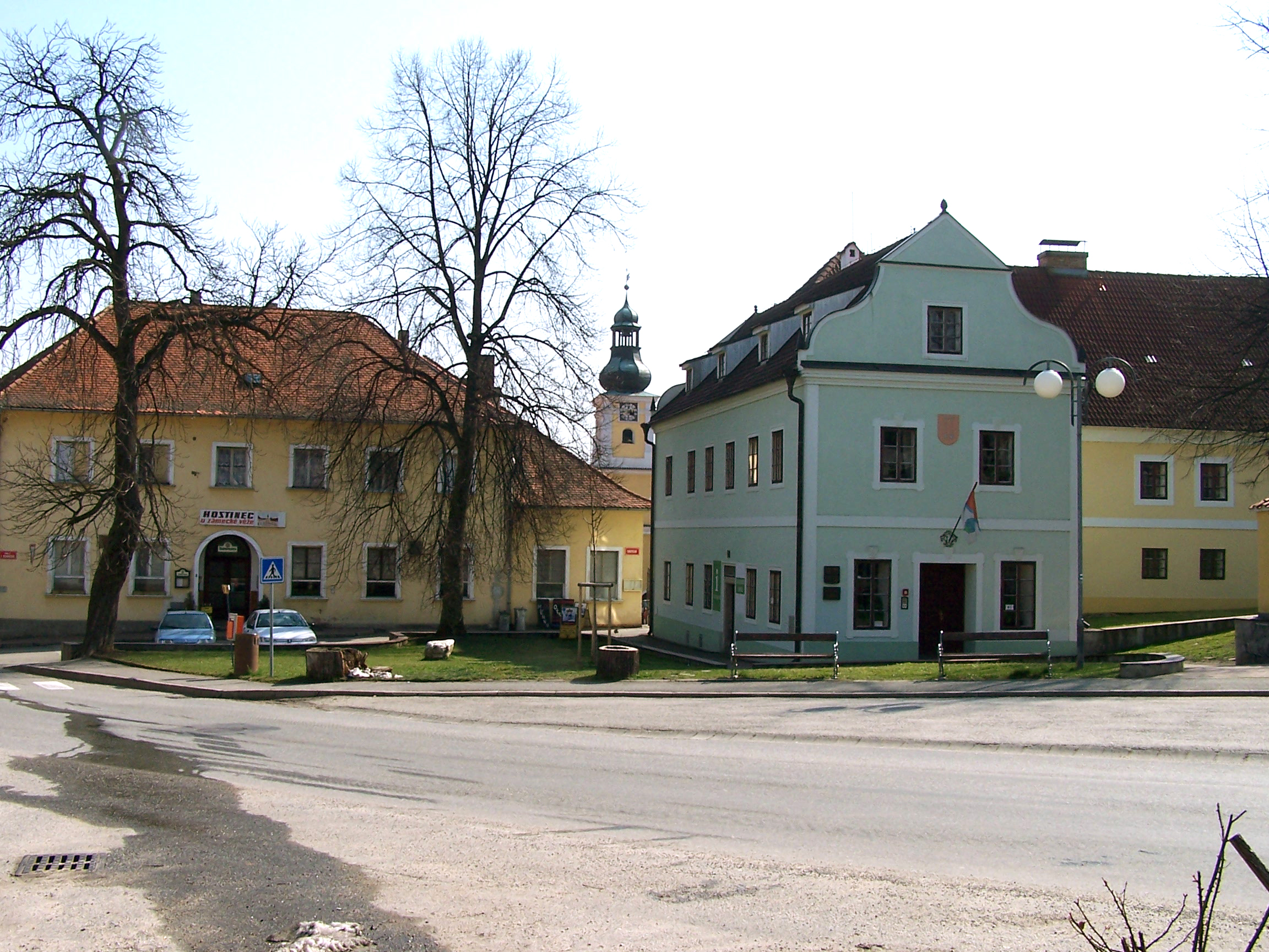 Obecní úřad v Římově (okres České Budějovice), v pozadí věž "Zámečku"